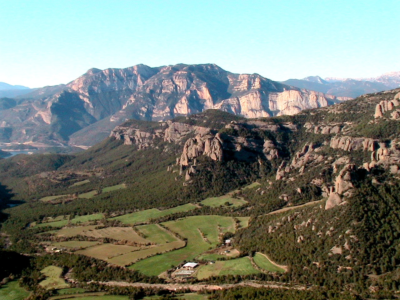 El Coscollet a la Serra d'Aubenç, des de Serra Seca This is a a photo of an emblematic summit in Catalonia, Spain, with id: CE-267091006 This is a a photo of a natural area in Catalonia, Spain, with id: ES510175